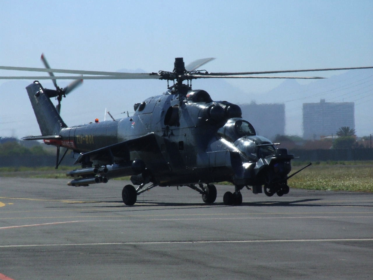 ATE Mi-24 SuperHind Mk.III ZU-BOI (2)